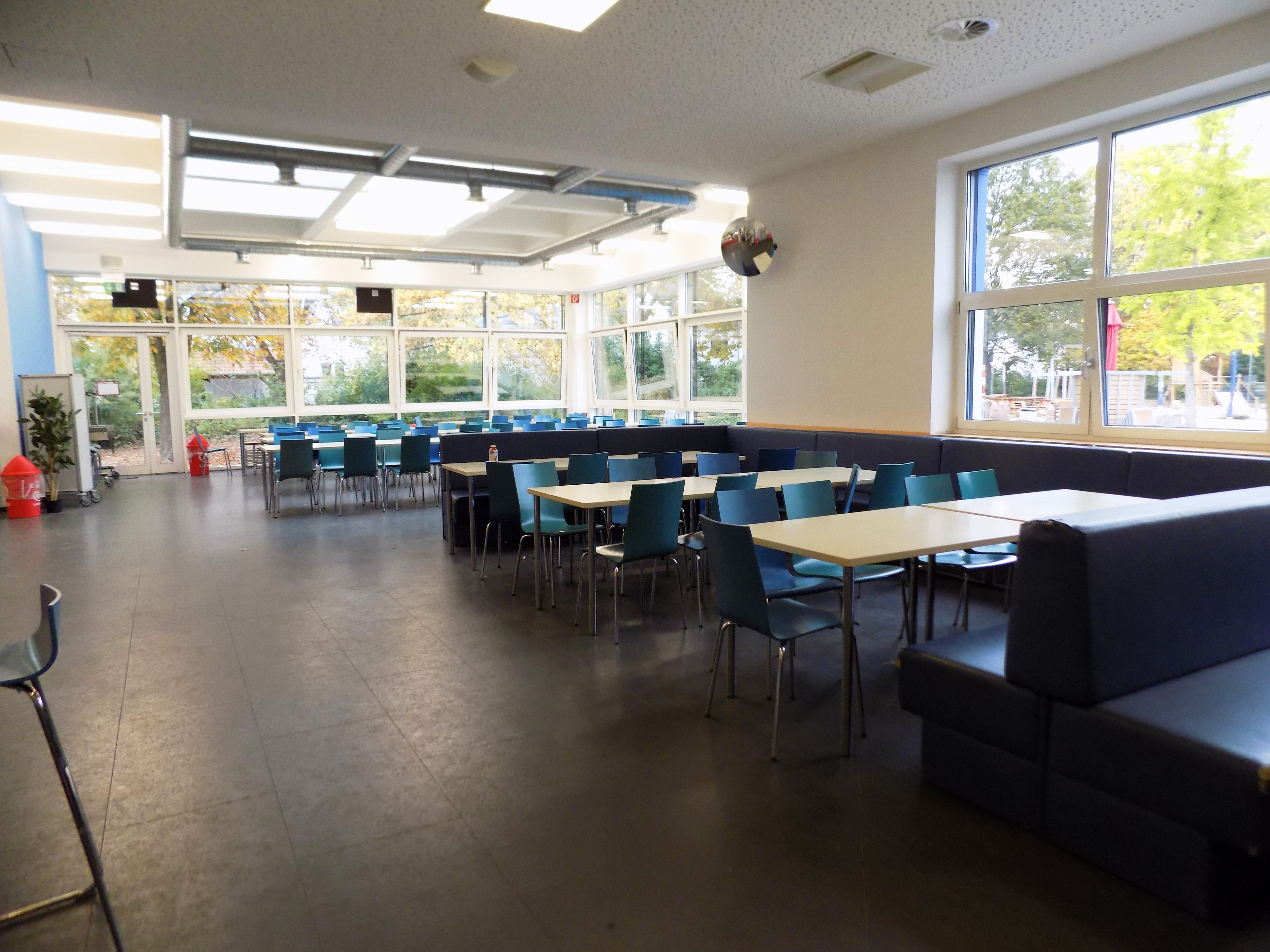 Die Mensa des KGS von der Seite.